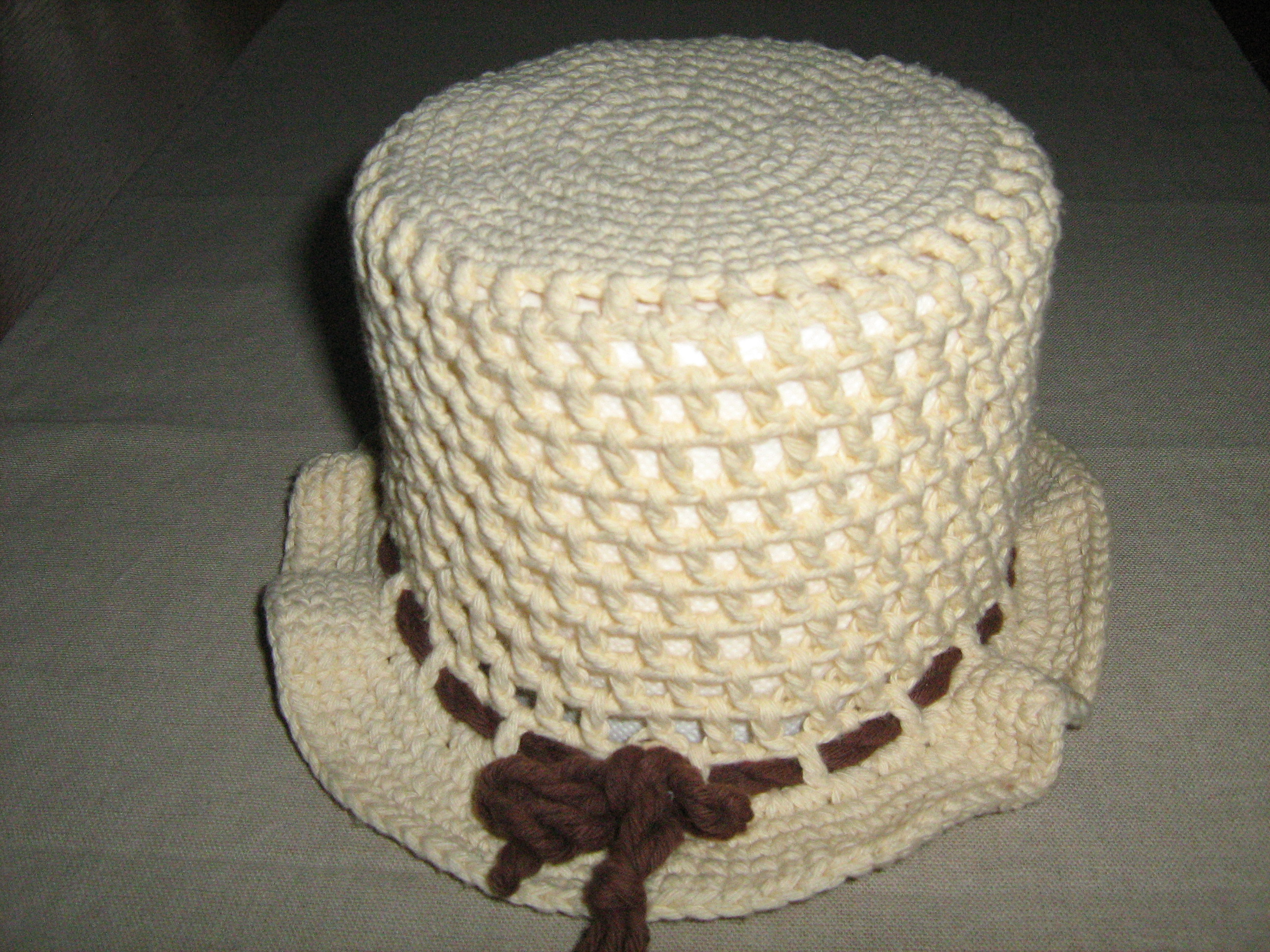 Toilettenrolle (im gehäckelten Überzug auf der Hutablage im Auto)